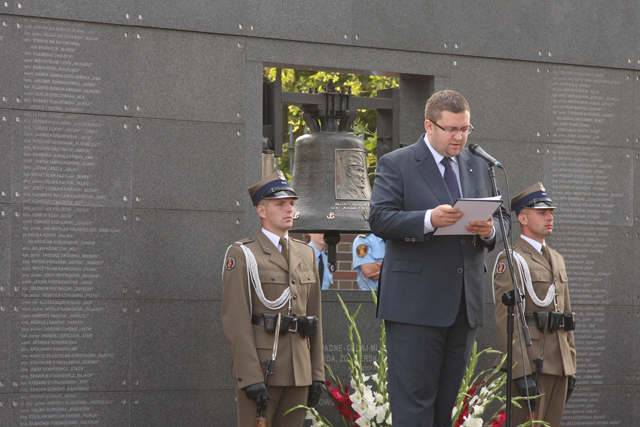 Jan Ołdakowski podczas 65. rocznicy wybuchu Powstania Warszawskiego